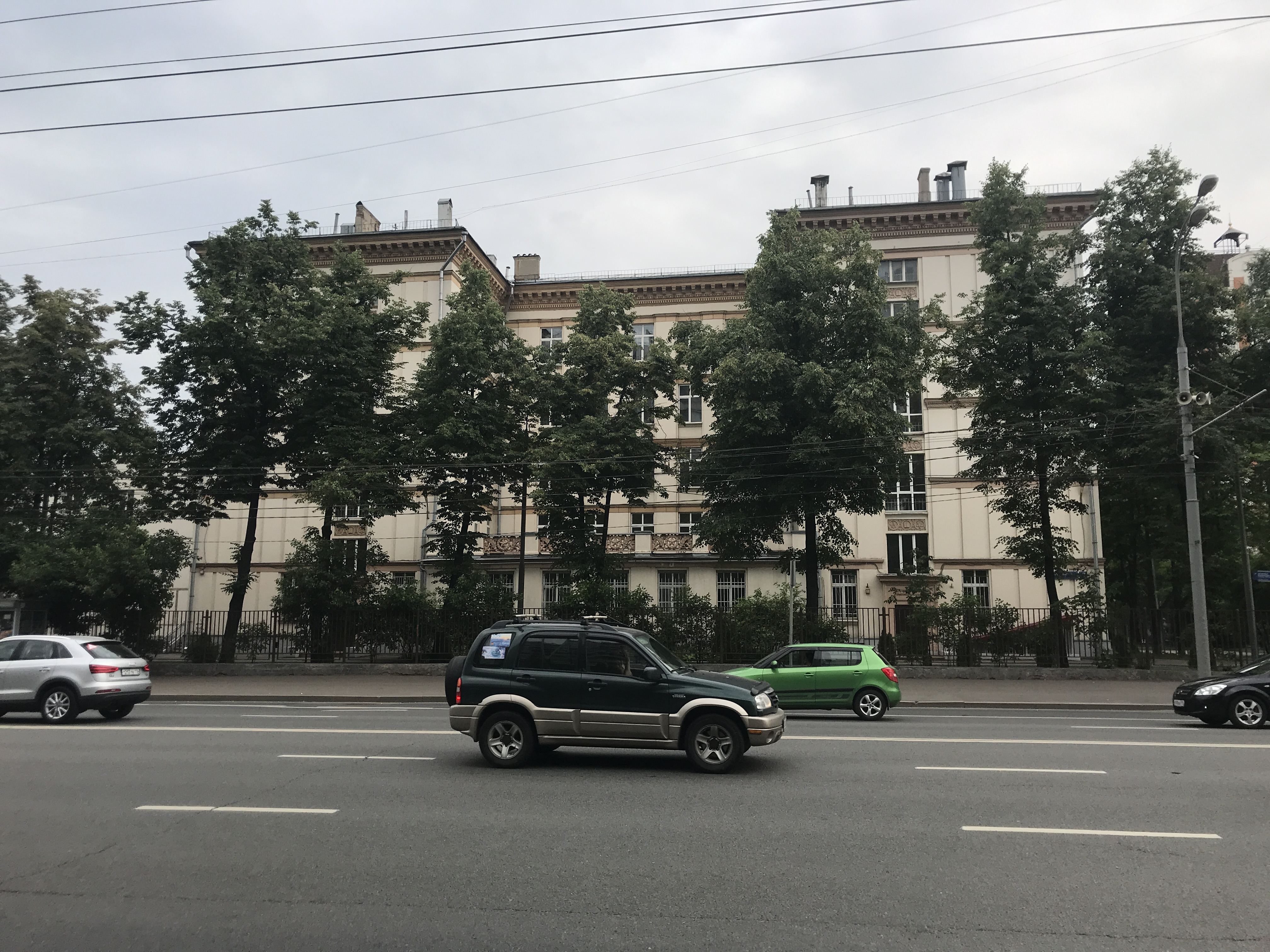 СП 8 школы 1288 (бывшая школа французская 1244)